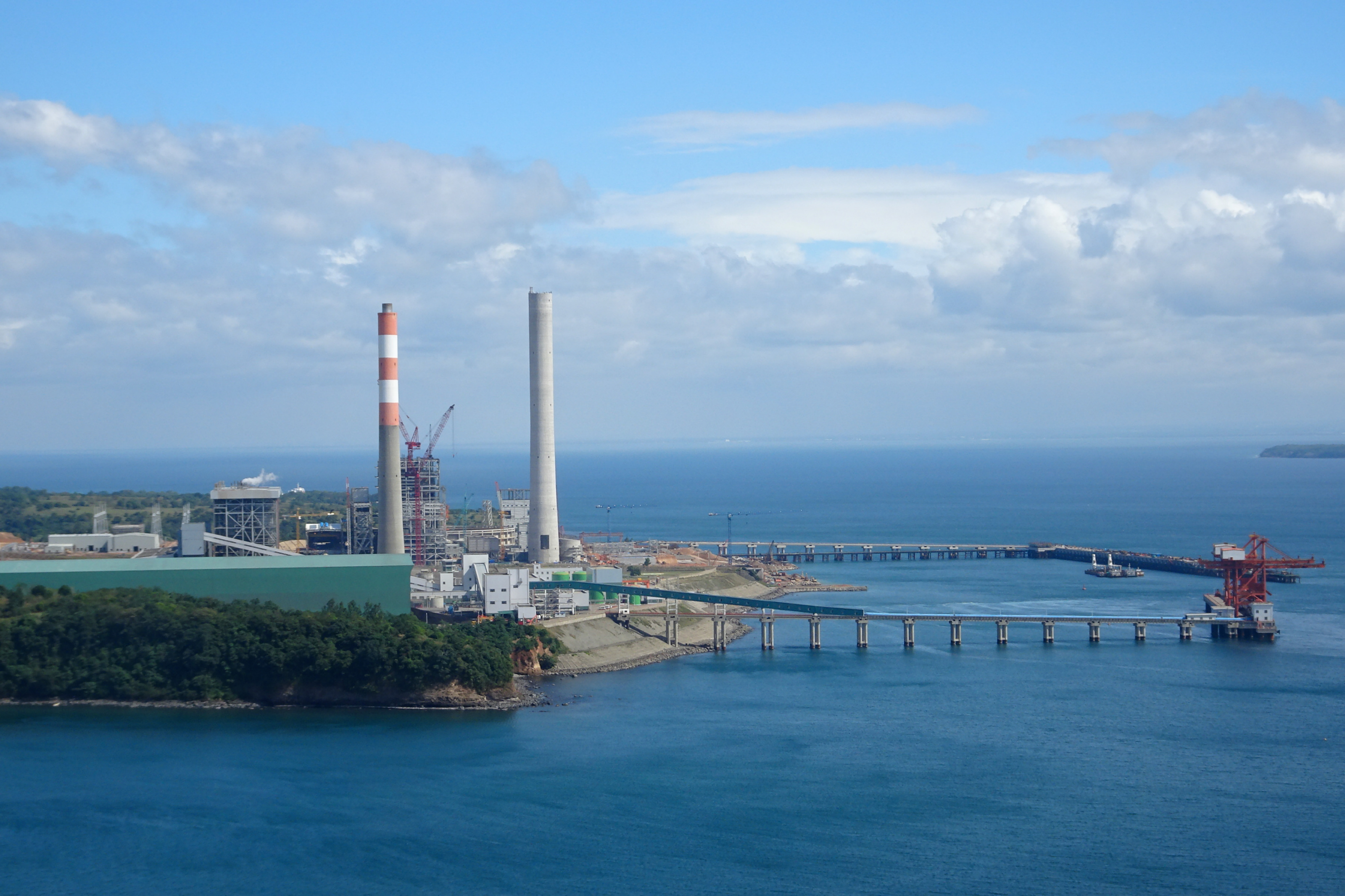 Mariveles, Bataan, Philippines